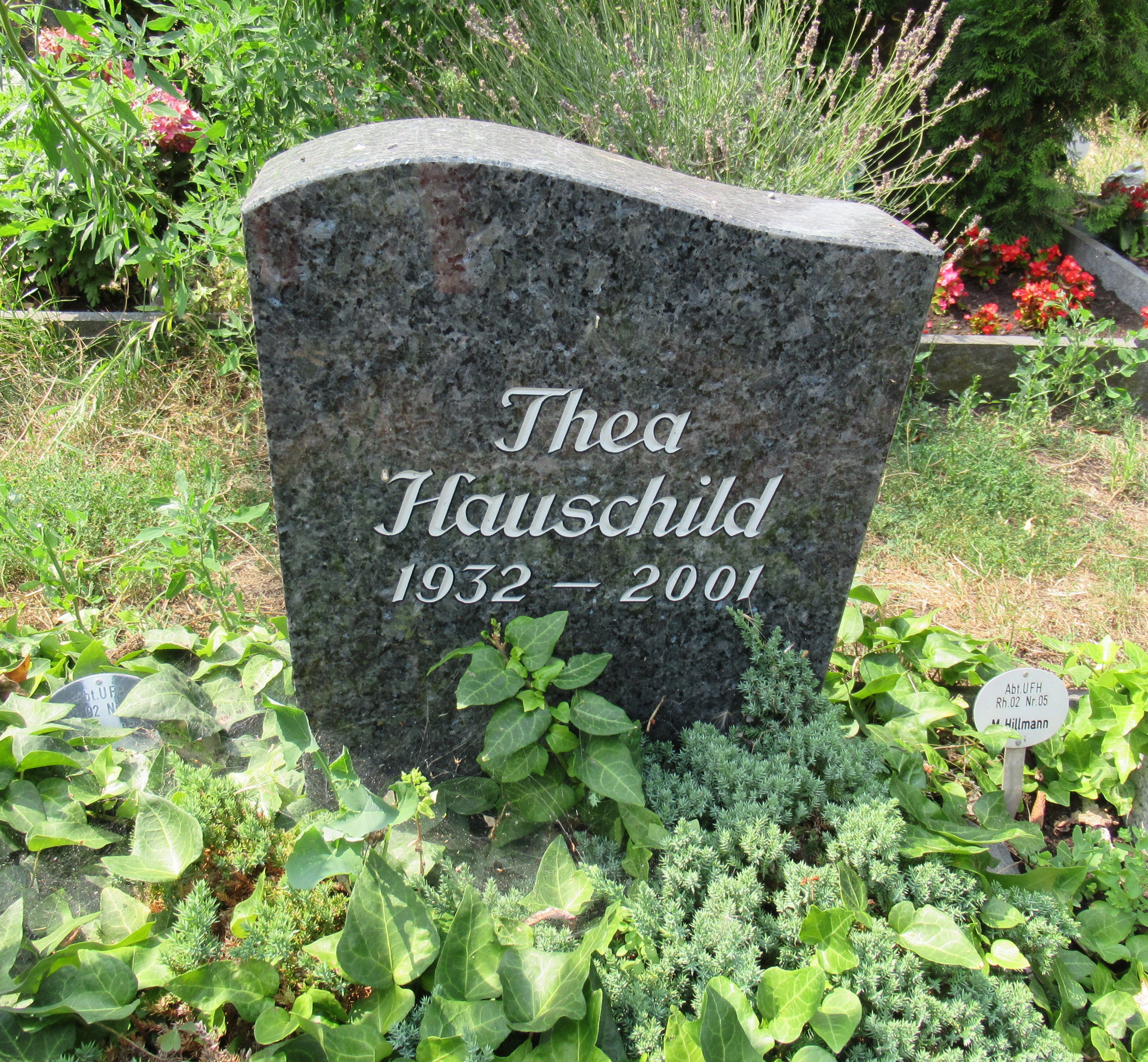 Grabstein der Volkskammerabgeordneten Thea Hauschild auf dem Friedhof Stralau, Berlin-Stralau.